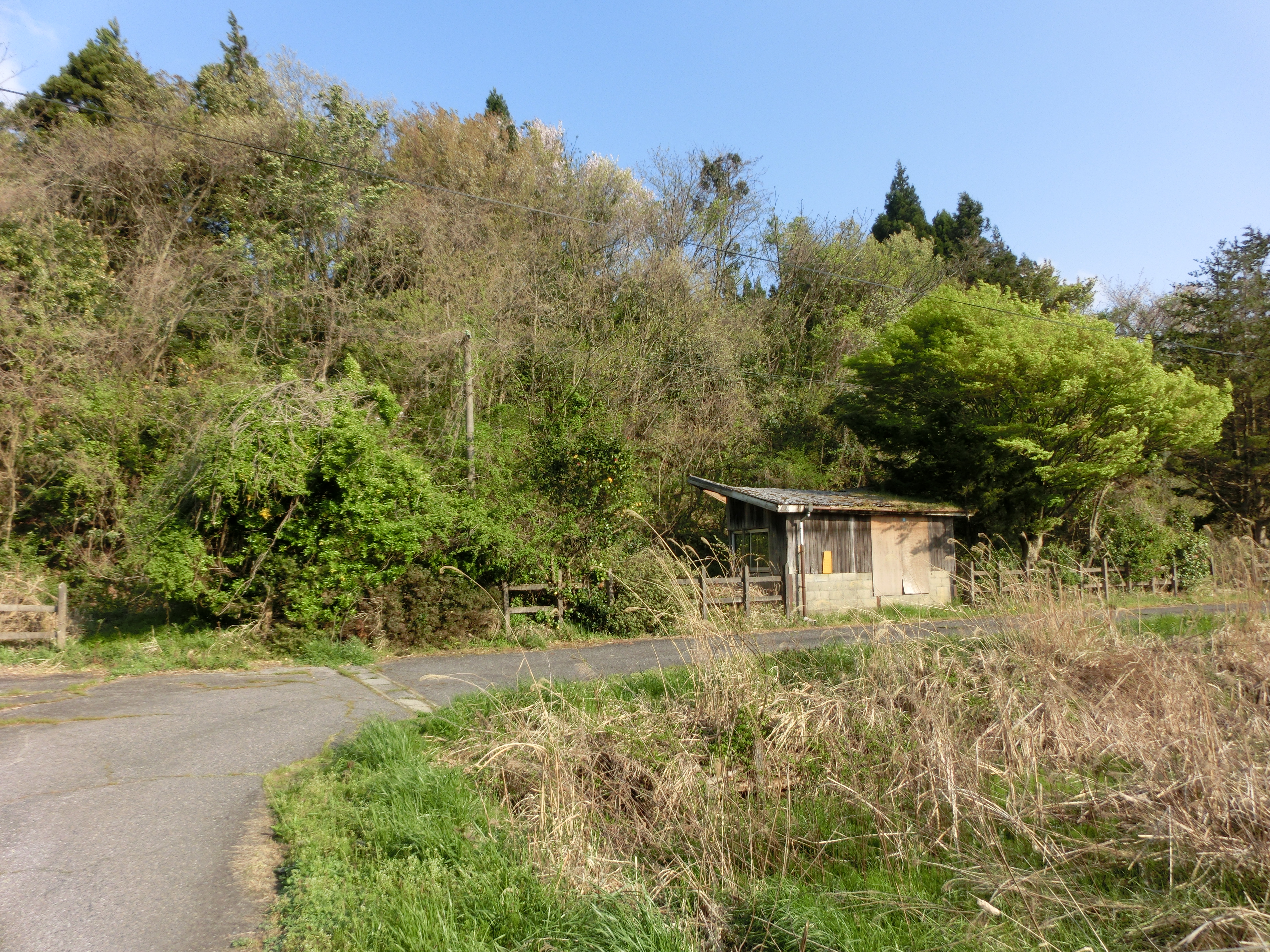 廃止後の古君駅全景